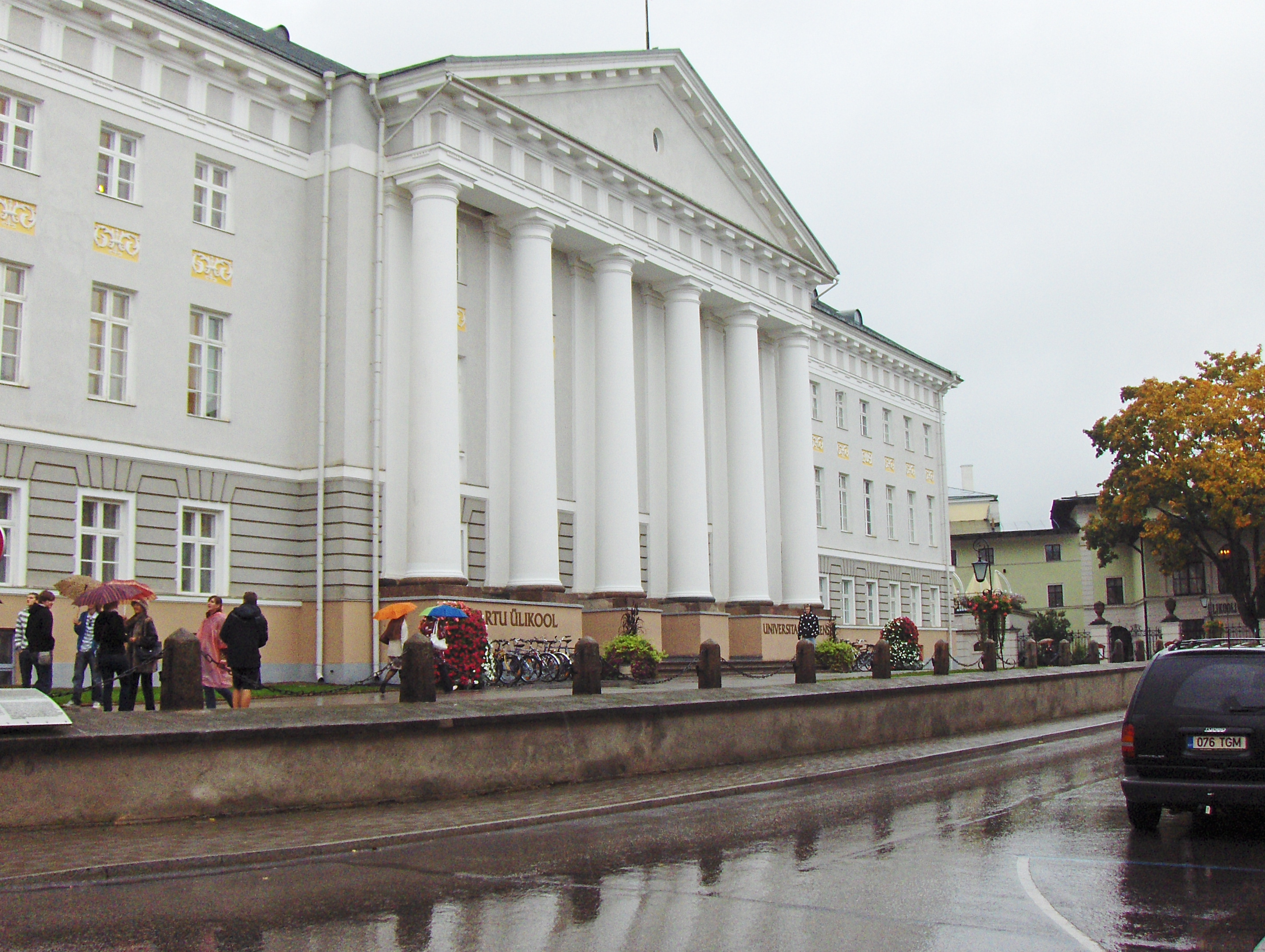 Tartu